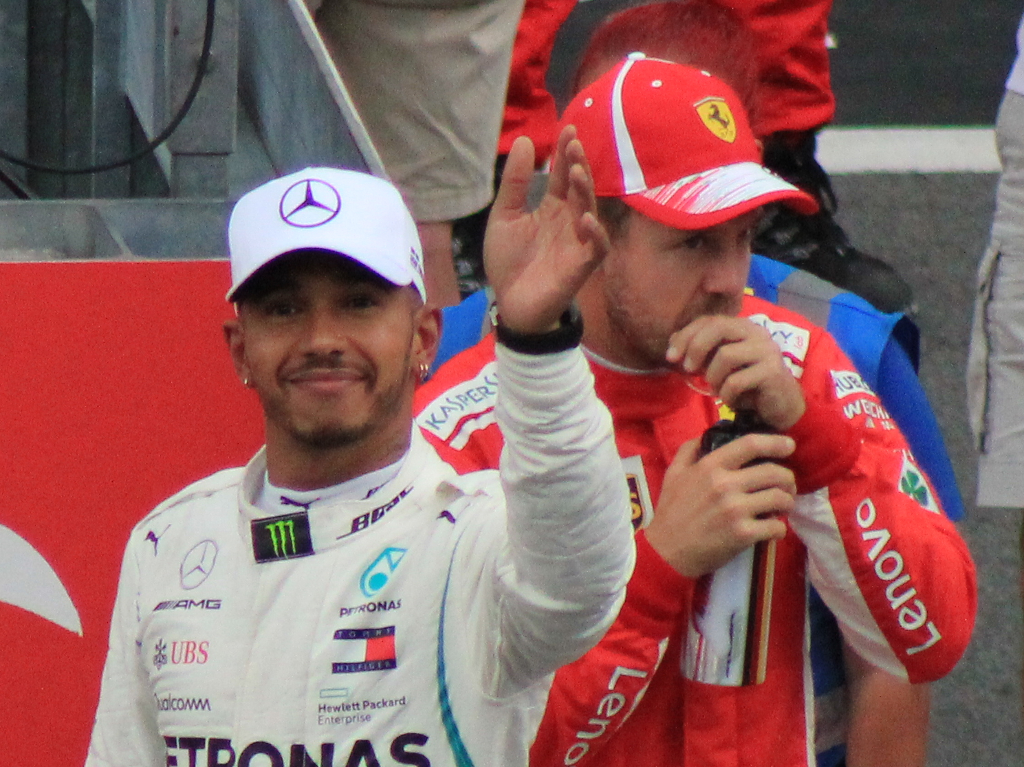 Hamilton nach dem Qualifying